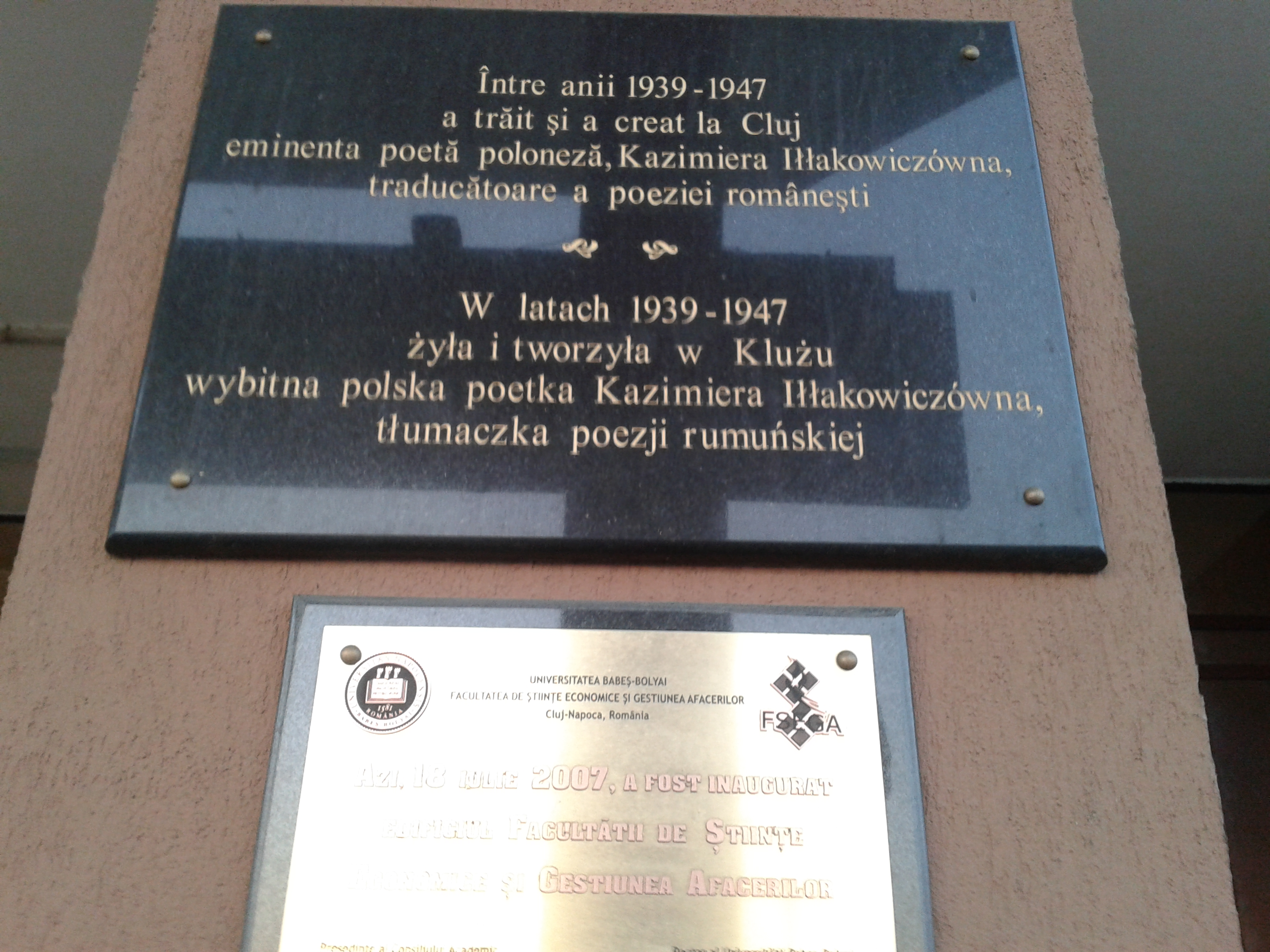 Placă comemorativă pe Clădirea FSEGA din Cluj-Napoca "Între anii 1939-1947 a trăit şi a creat la Cluj eminenta poetă poloneză, Kazimiera Iłłakowiczówna, traducătoare a poeziei româneşti. W latach 1939-1947 żyła i tworzyła w Klużu wybitna polska poetka Kazimiera Iłłakowiczówna, tłumaczka poezji rumuńskiej."